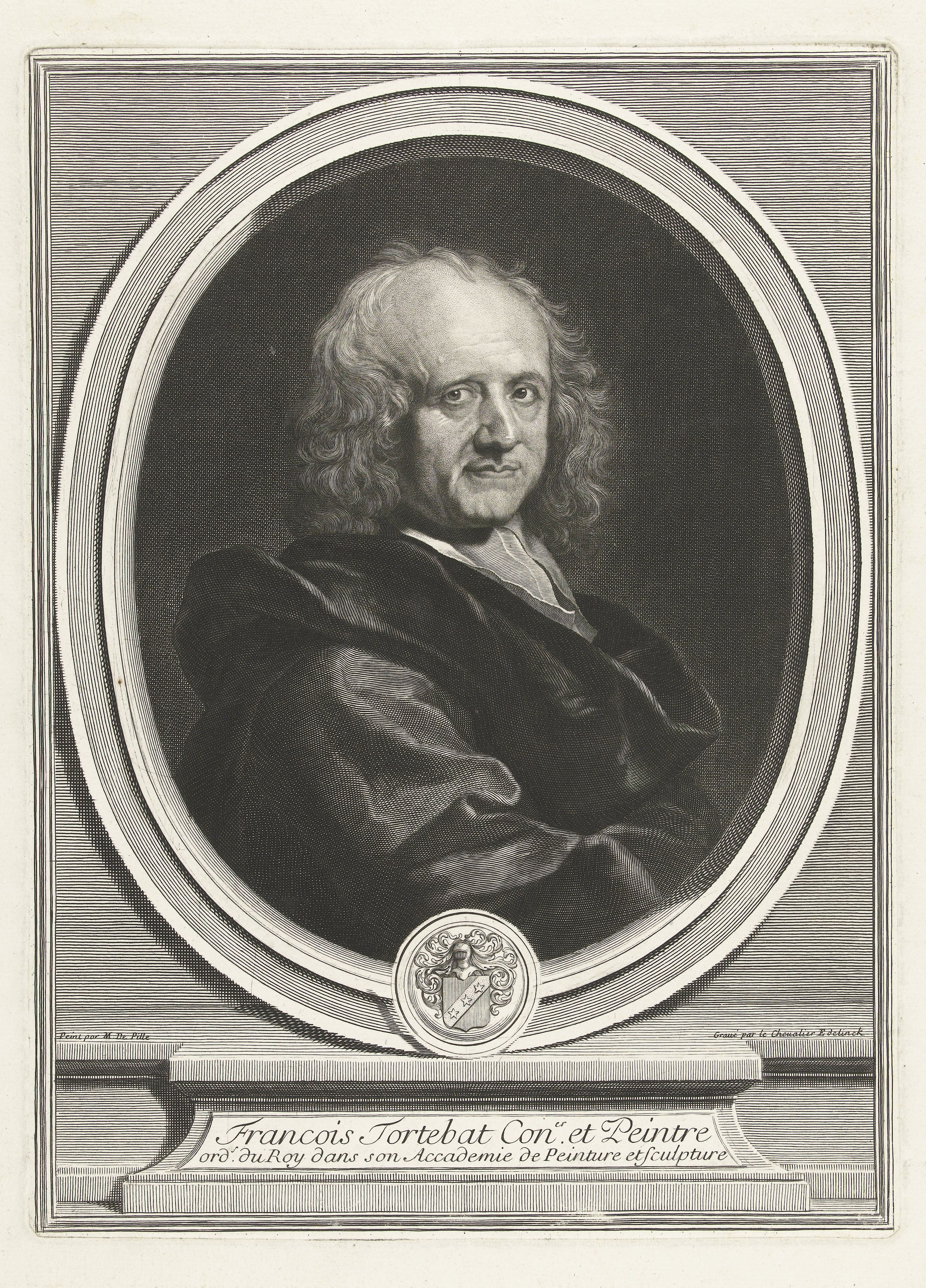 IdentificatieTitel(s): Portret van François TortebatObjecttype: prent Objectnummer: RP-P-BI-7409XCatalogusreferentie: Robert-Dumesnil 328Opschriften / Merken: verzamelaarsmerk, verso, gestempeld: Lugt 240Omschrijving: Portret van de Franse prentmaker en schilder François Tortebat (1621-1690), afgebeeld in ovale omlijsting met wapen.VervaardigingVervaardiger: prentmaker: Gerard Edelinck (vermeld op object)naar schilderij van: De Pille (vermeld op object)Plaats vervaardiging: prentmaker: Frankrijk (mogelijk)naar schilderij van: onbekendDatering: 1652 - 1707Fysieke kenmerken: gravureMateriaal: papier Techniek: graveren (drukprocedé)Afmetingen: plaatrand: h 344 mm × b 252 mmOnderwerpWie: François TortebatVerwerving en rechtenVerwerving: overdracht van beheer 1816Copyright: Publiek domein